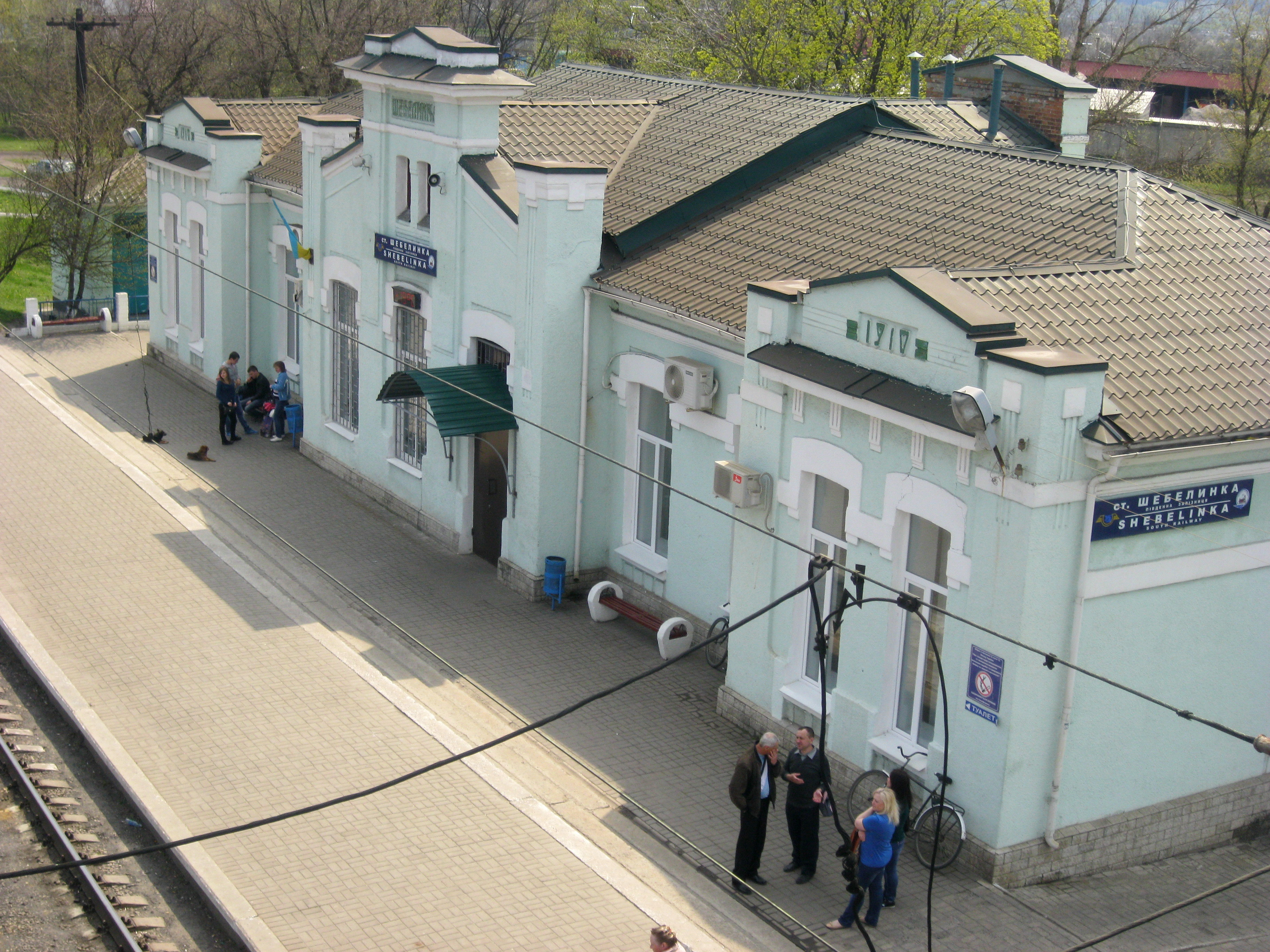 ЖД станція Шебелинка